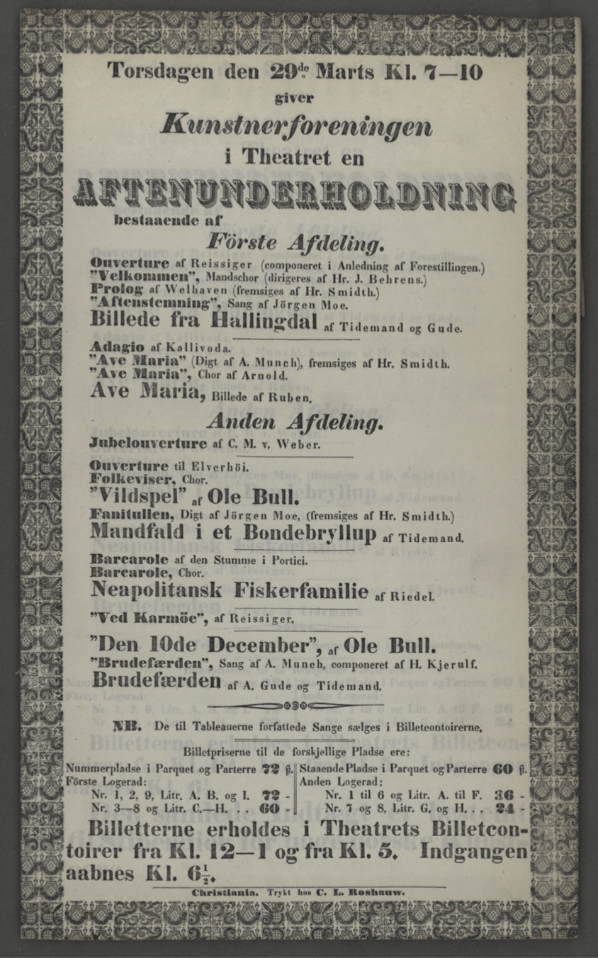 Christiania Theaters plakat som annonserer Kunstnerforeningens andre Aftenunderholdning i mars 1849